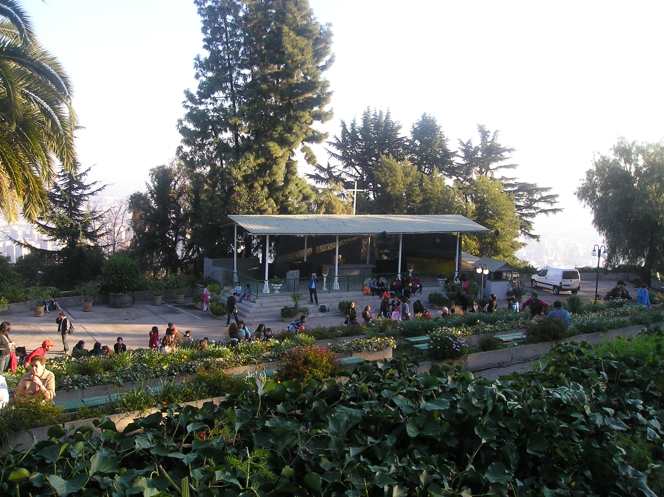 Imagen propia del autor, capturada el 23 de julio de 2006 en Santiago de Chile. La información de la camara y la imagen se detallan abajo